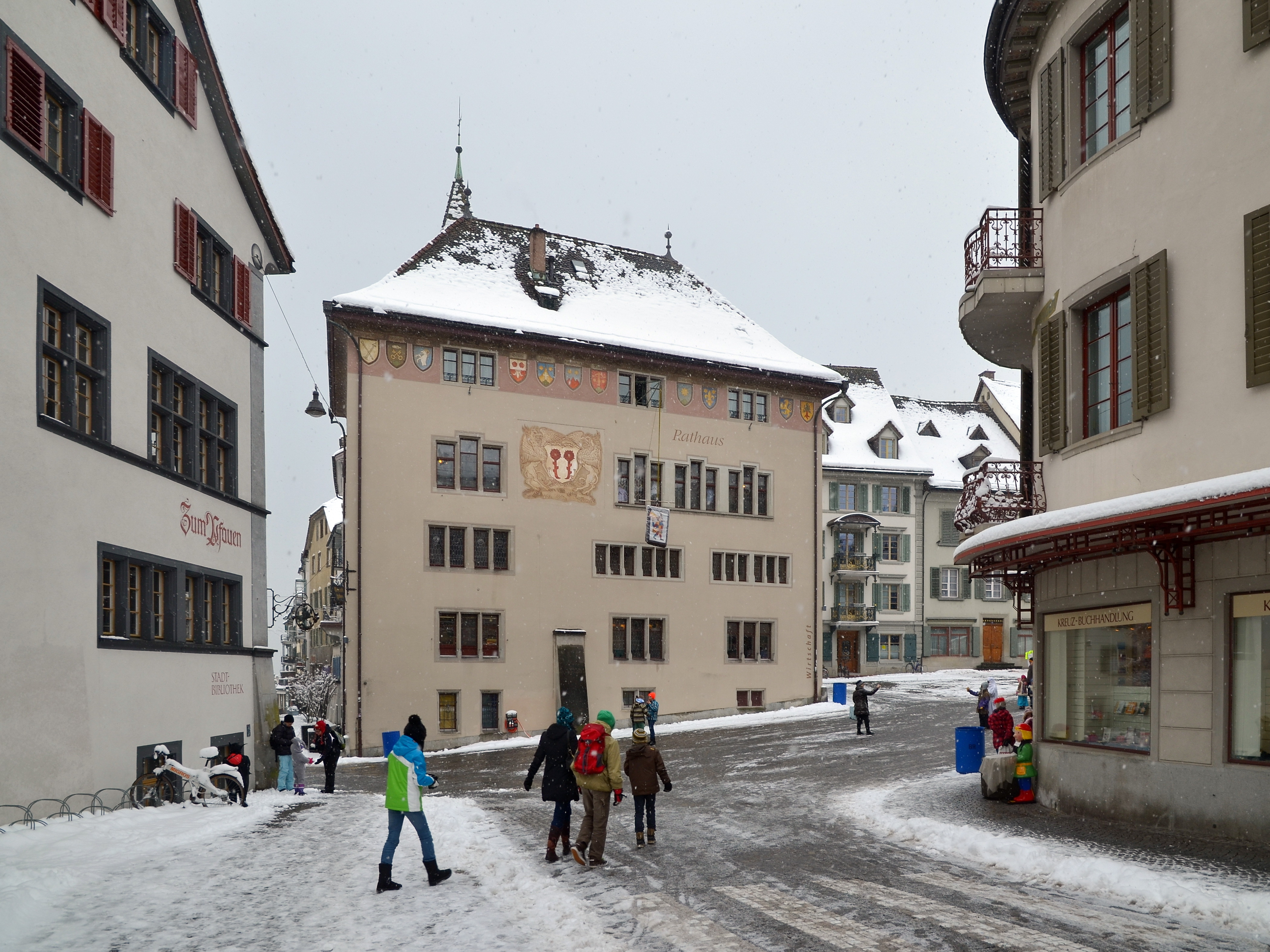 Eis-zwei-Geissebei at Rathaus respectively Hauptplatz square as seen from Rathausstrasse in Rapperswil (Switzerland)